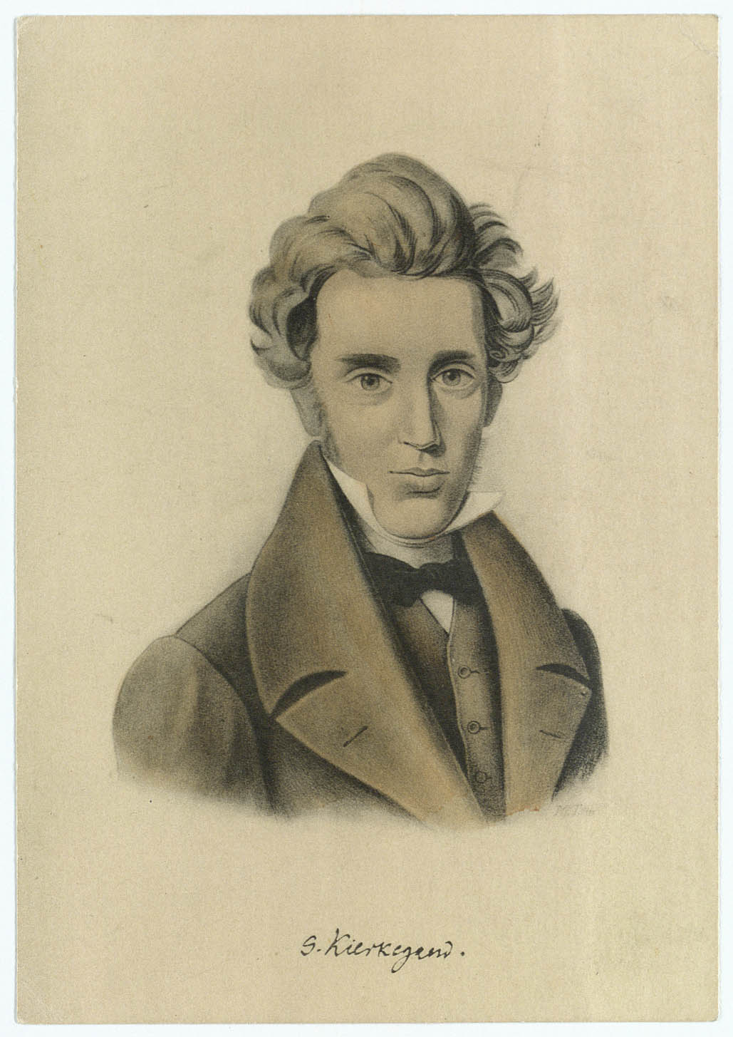 Postkort, håndkoloreret heliogravure, udført på grundlag af N.C. Kierkegaards tegning fra ca. 1840 N.C. Kierkegaard (1806-1882), tegner, litograf KB id: ke007201 Uid:dk:kb:doms:2007-01/4c848d80-851f-11df-8554-0016357f605f The Royal Library, National Collections Department, Prints and Photographs